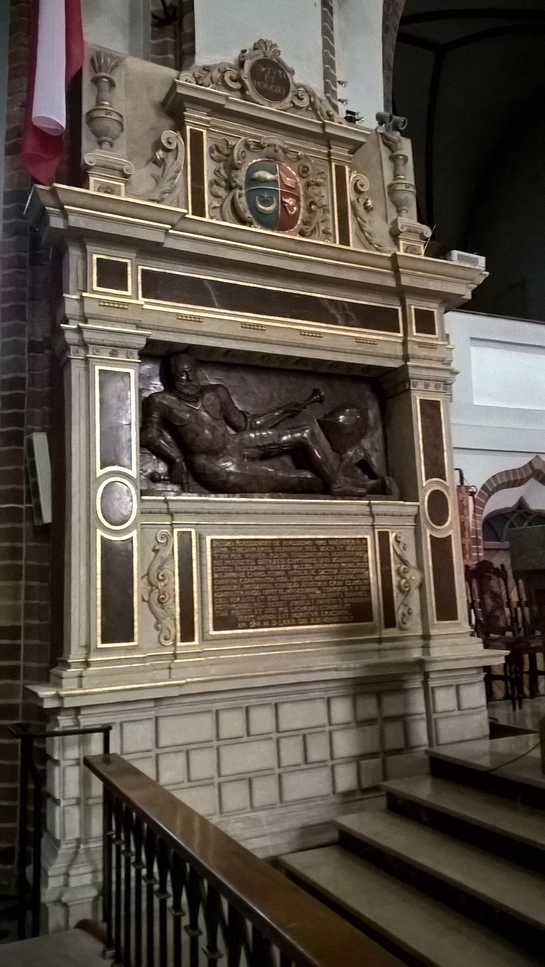 Bazylika w Szamotułach - nagrobek Jakuba Rokossowskiego zmarłego w 1580 roku podskarbiego koronnego – wykonany z czerwonego marmuru i piaskowca autorstwa Hieronima Canavesi